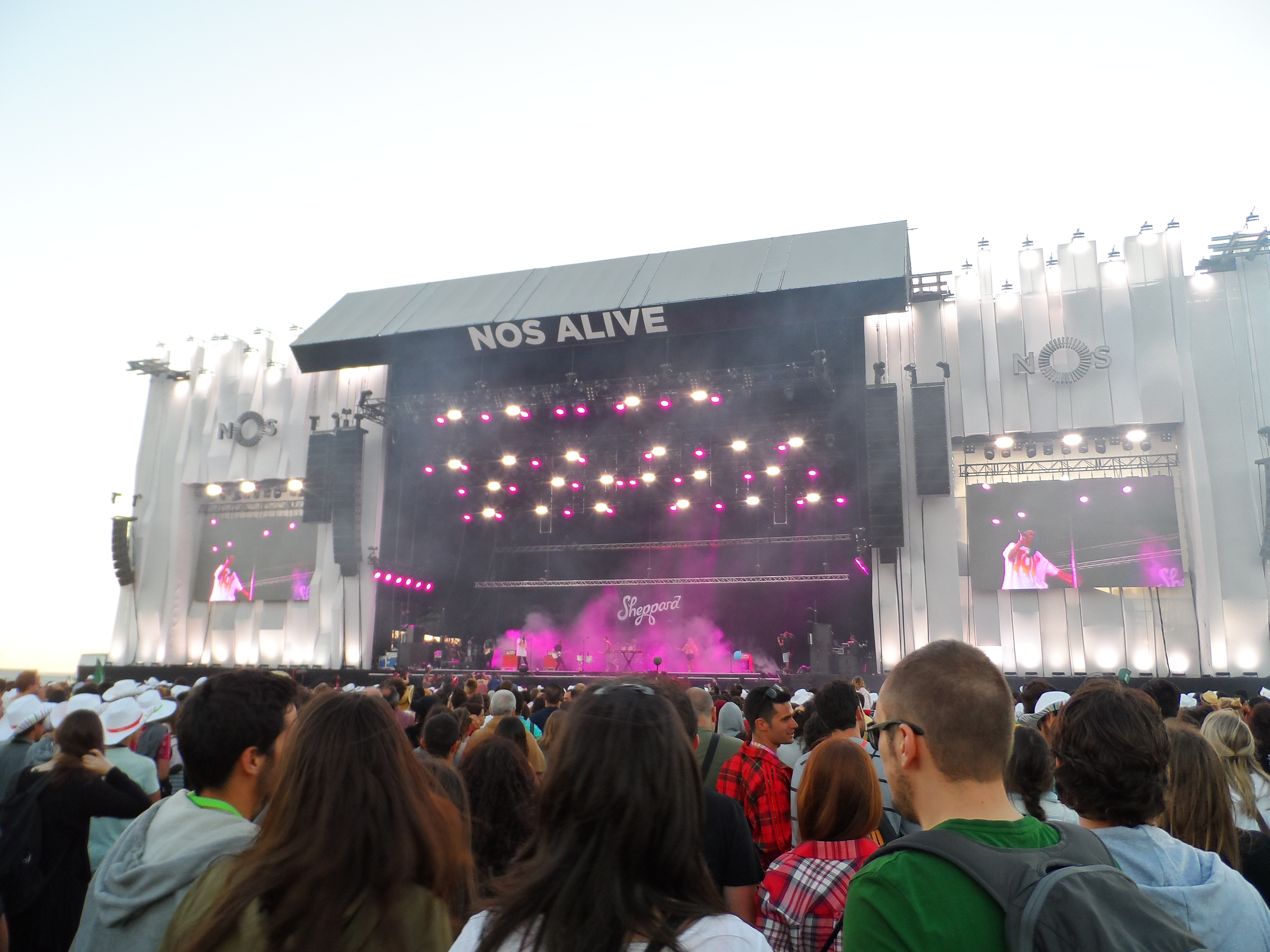 Shepperd